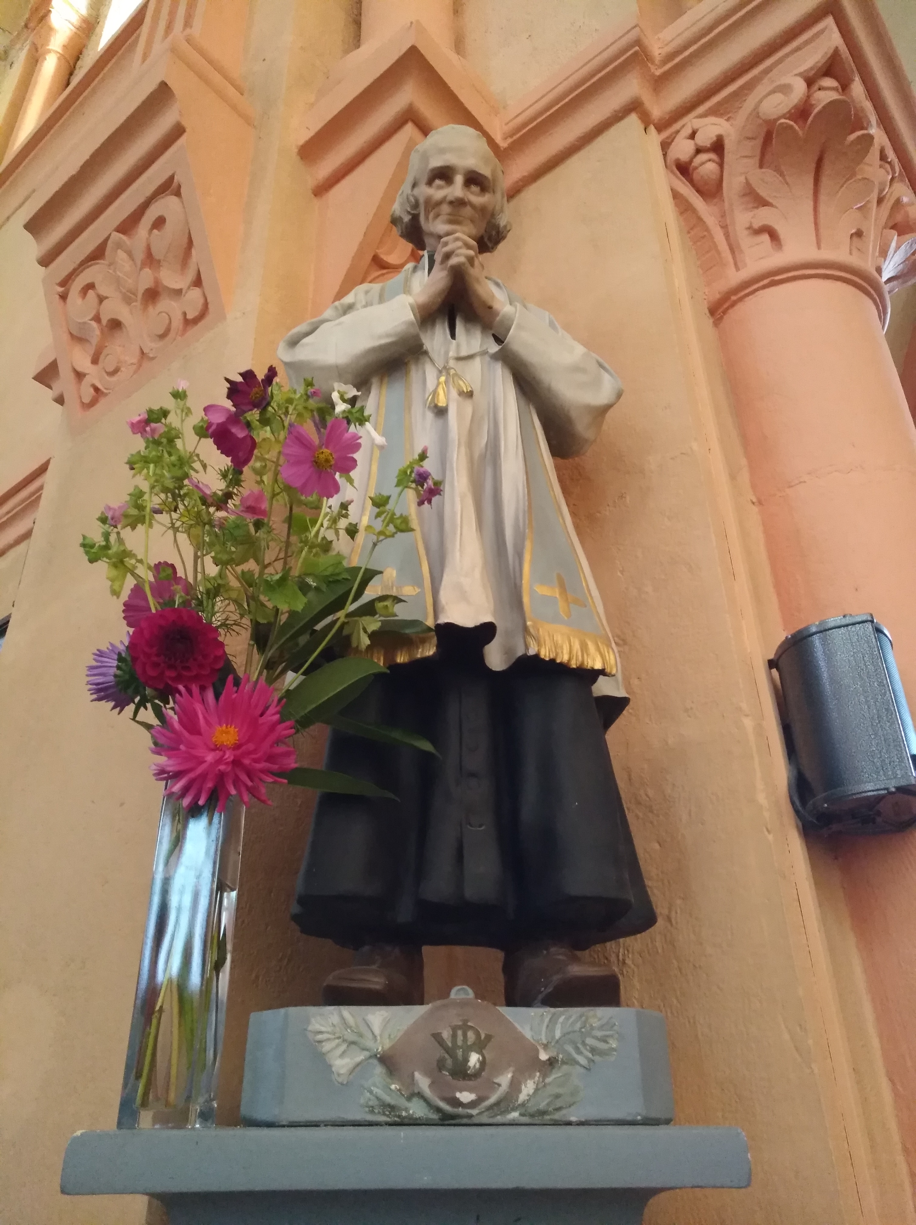 Statue de Jean-Marie Vianney dans l'église Sainte-Madeleine de Chénelette (Rhône, France).